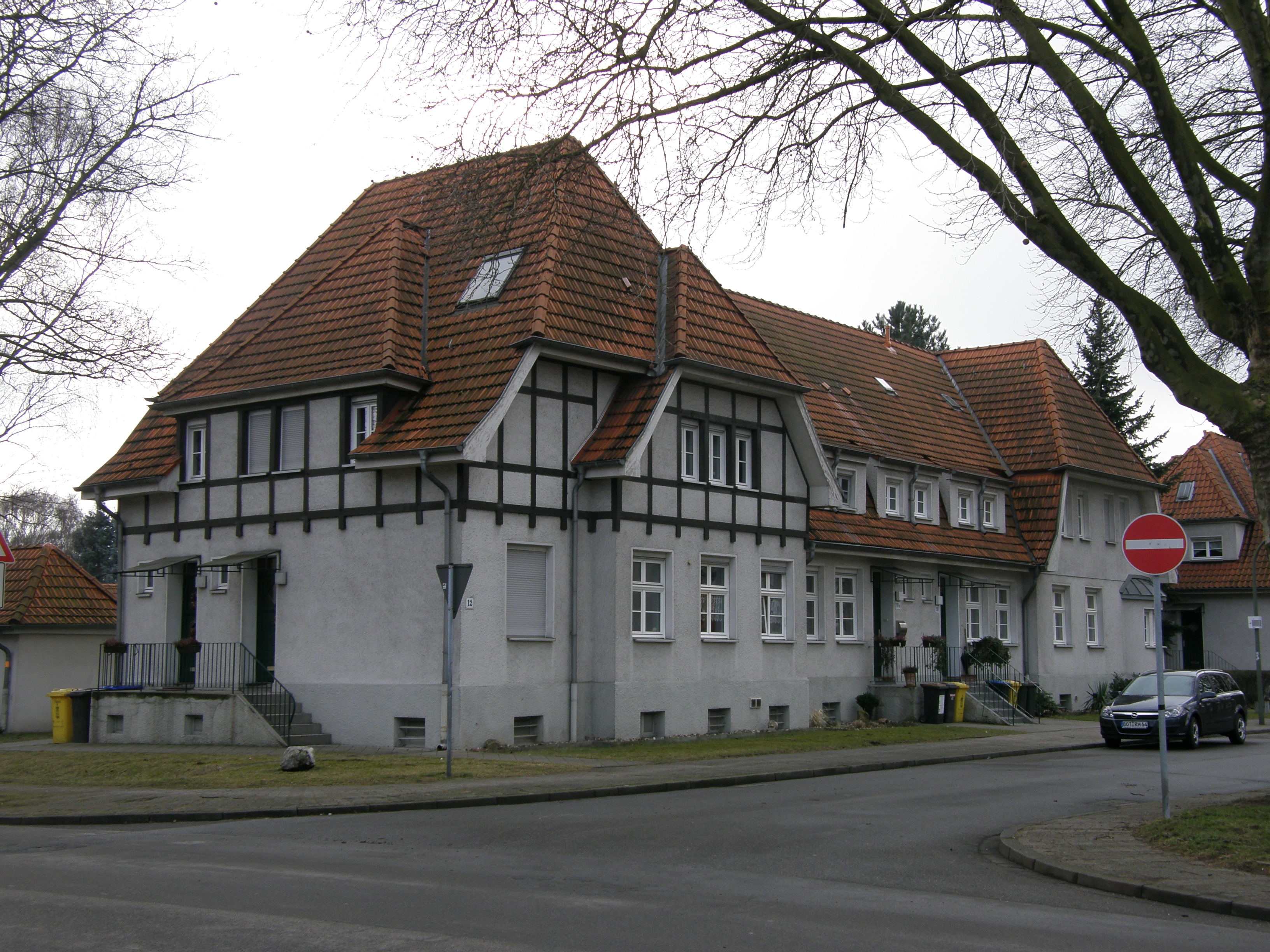 Gartenstadt Welheim in Bottrop. Mehrfamilienhaus mit herausgearbeitetem Fachwerk.